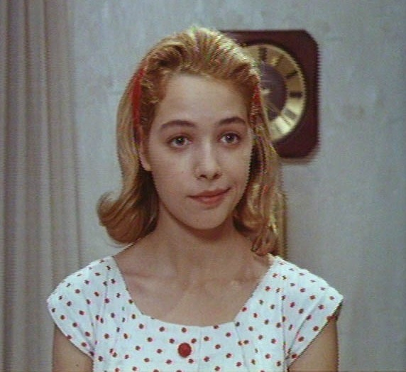 מילי אביטל בסרטו של יעקב גולדווסר, "מעבר לים ", 1991